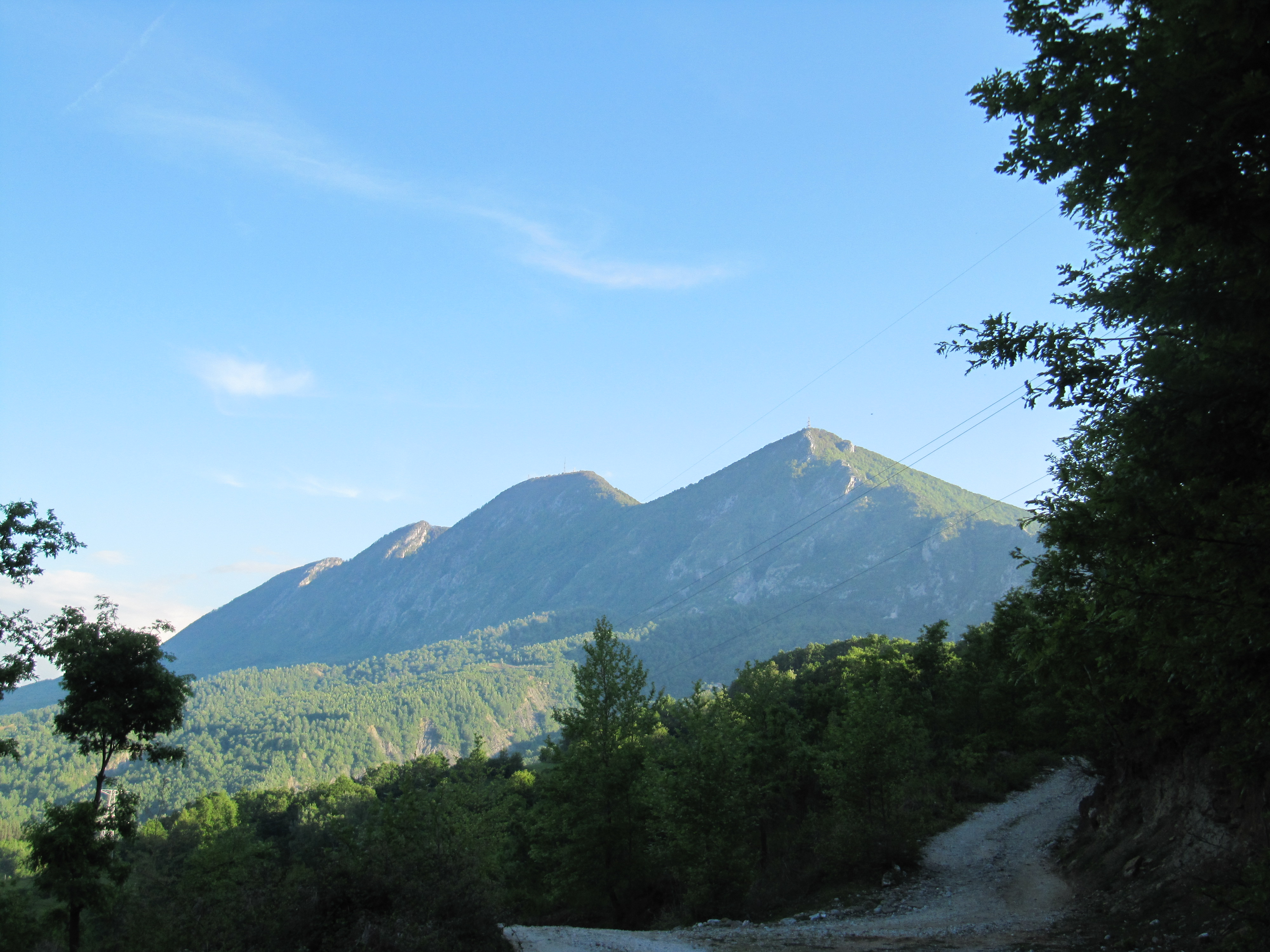 Mali i Dajtit, i parë nga mbrapa. Tiranë, Republika e Shqipërisë